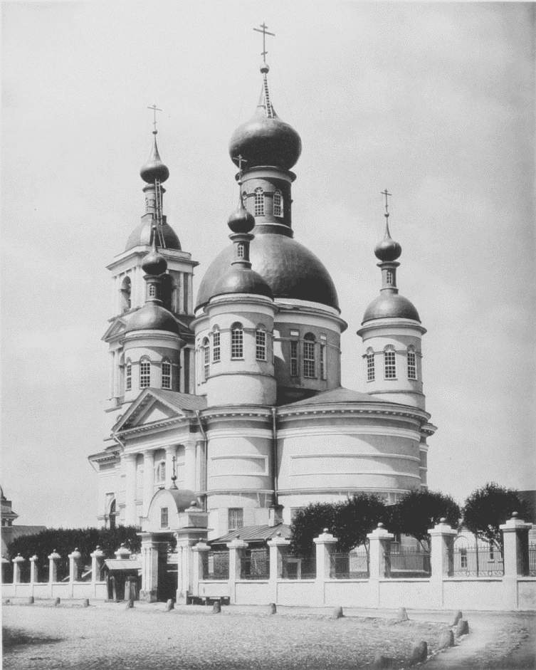 Единоверческая церковь Святой Троицы Введенской единоверческой общины в Лефортове.